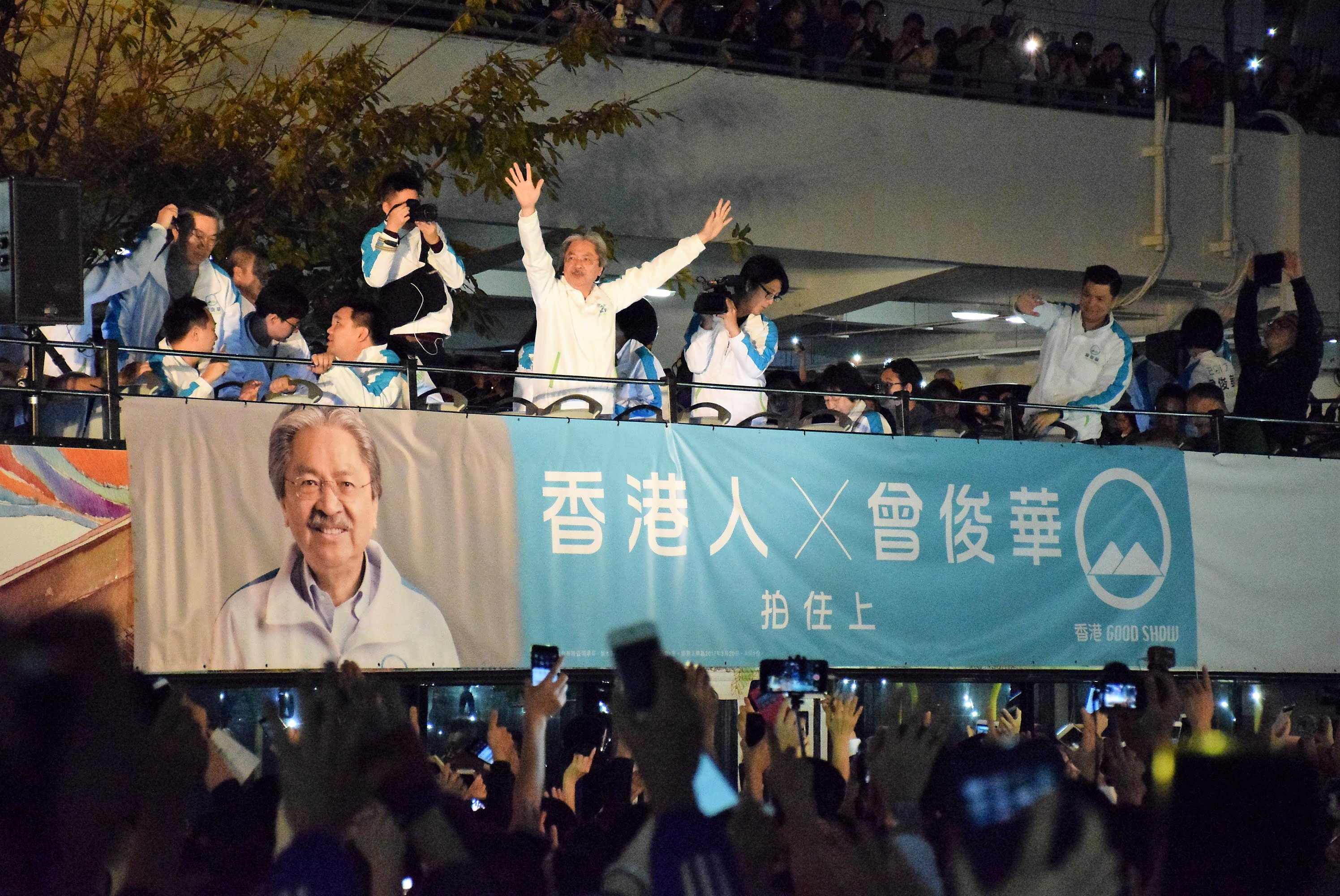 中文（香港）: 香港特首選舉候選人曾俊華向支持者揮手 (美國之音湯惠芸拍攝)